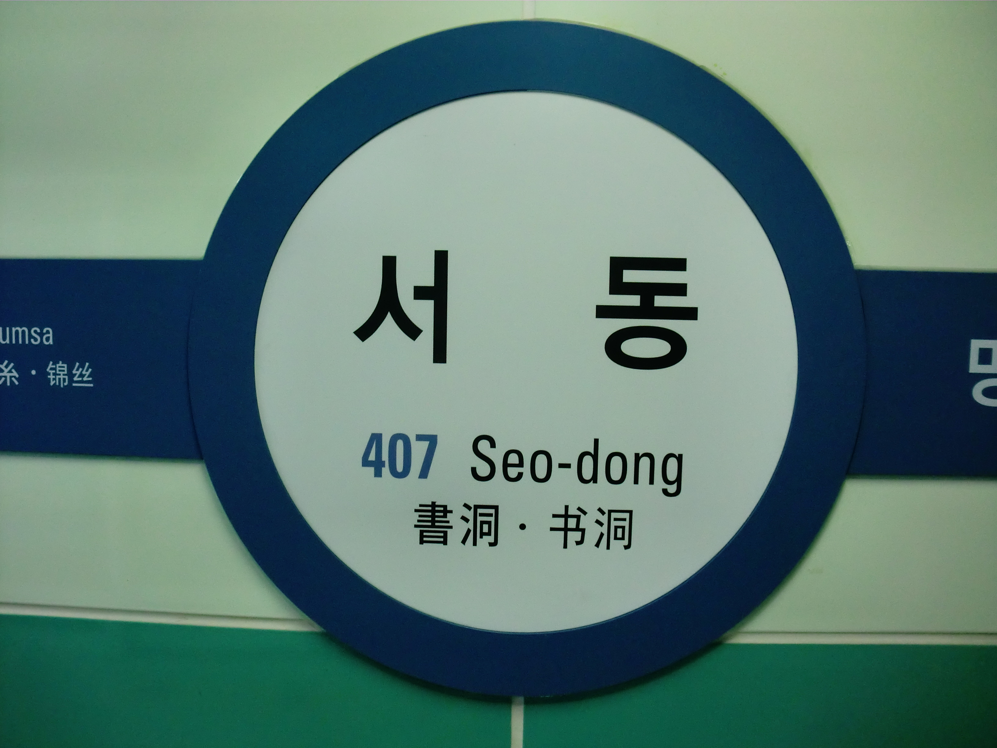 부산도시철도 4호선 서동역의 역명판